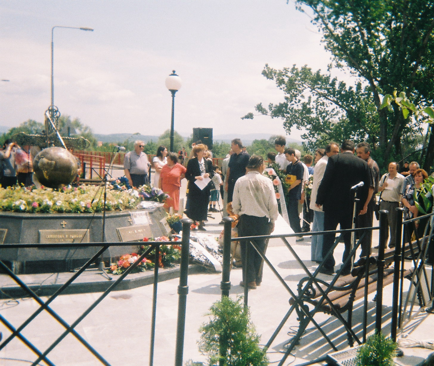 Комеморација код споменика погинулима у НАТО бомбардовању варваринског моста (Варварин, 30. мај 2001.)